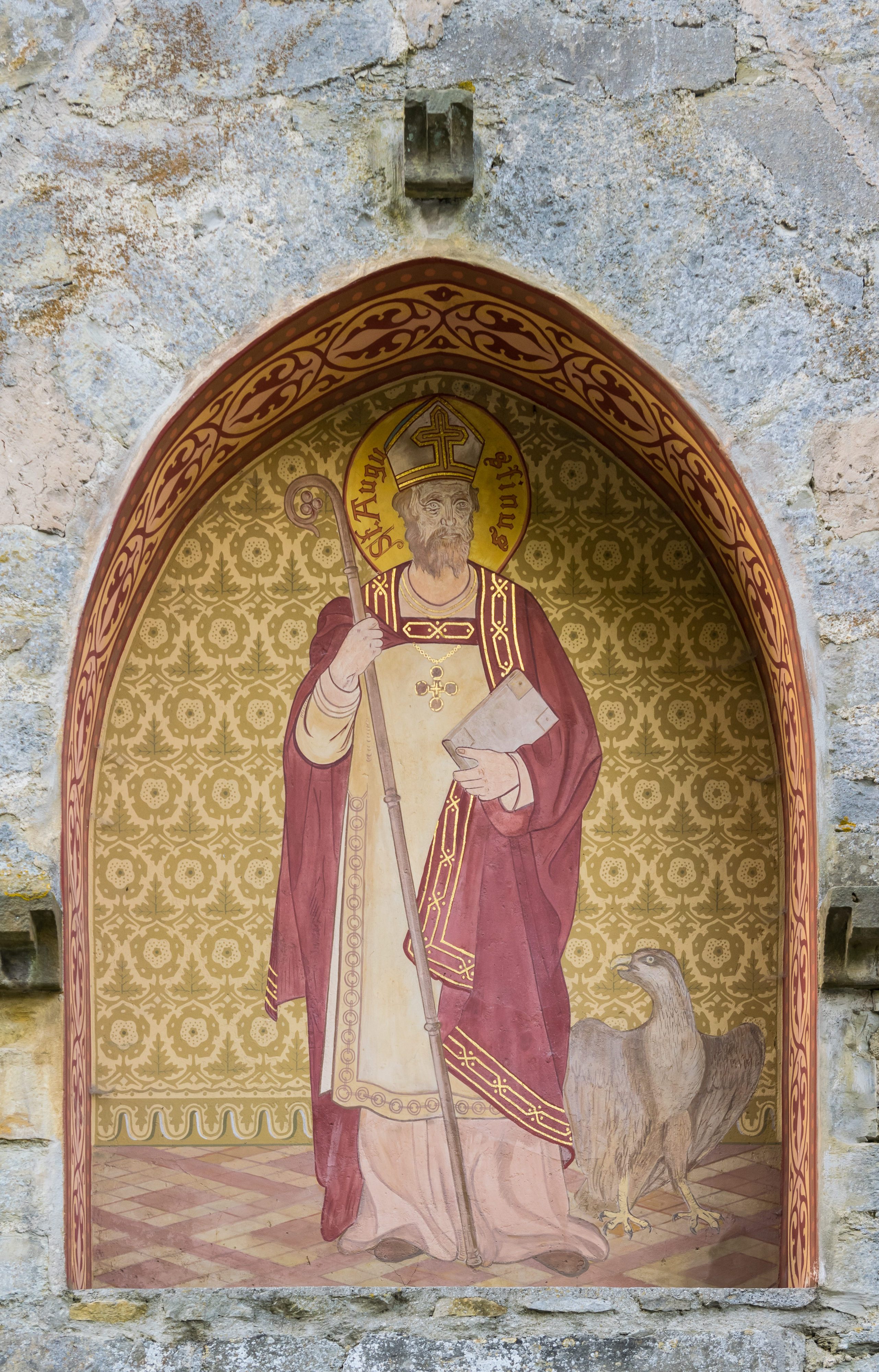 Gut Böddeken, ehemaliges Kloster in Büren, Kreis Paderborn